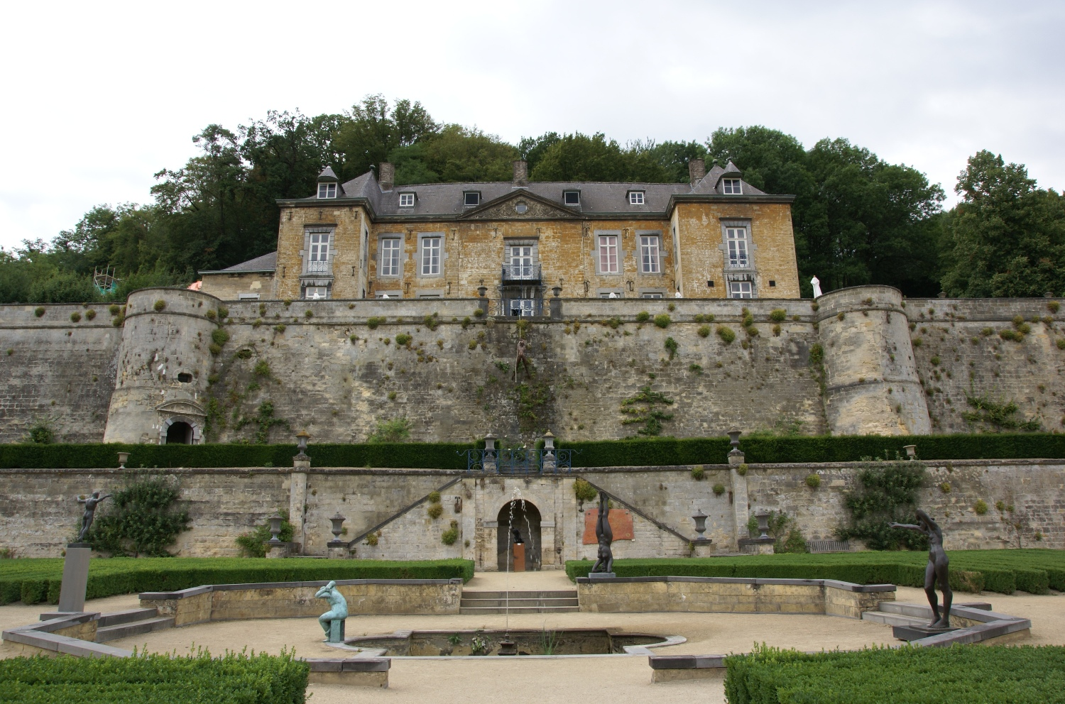 Rijksmonument 27951 - Chateau Neercanne, Cannerweg 800, Maastricht.